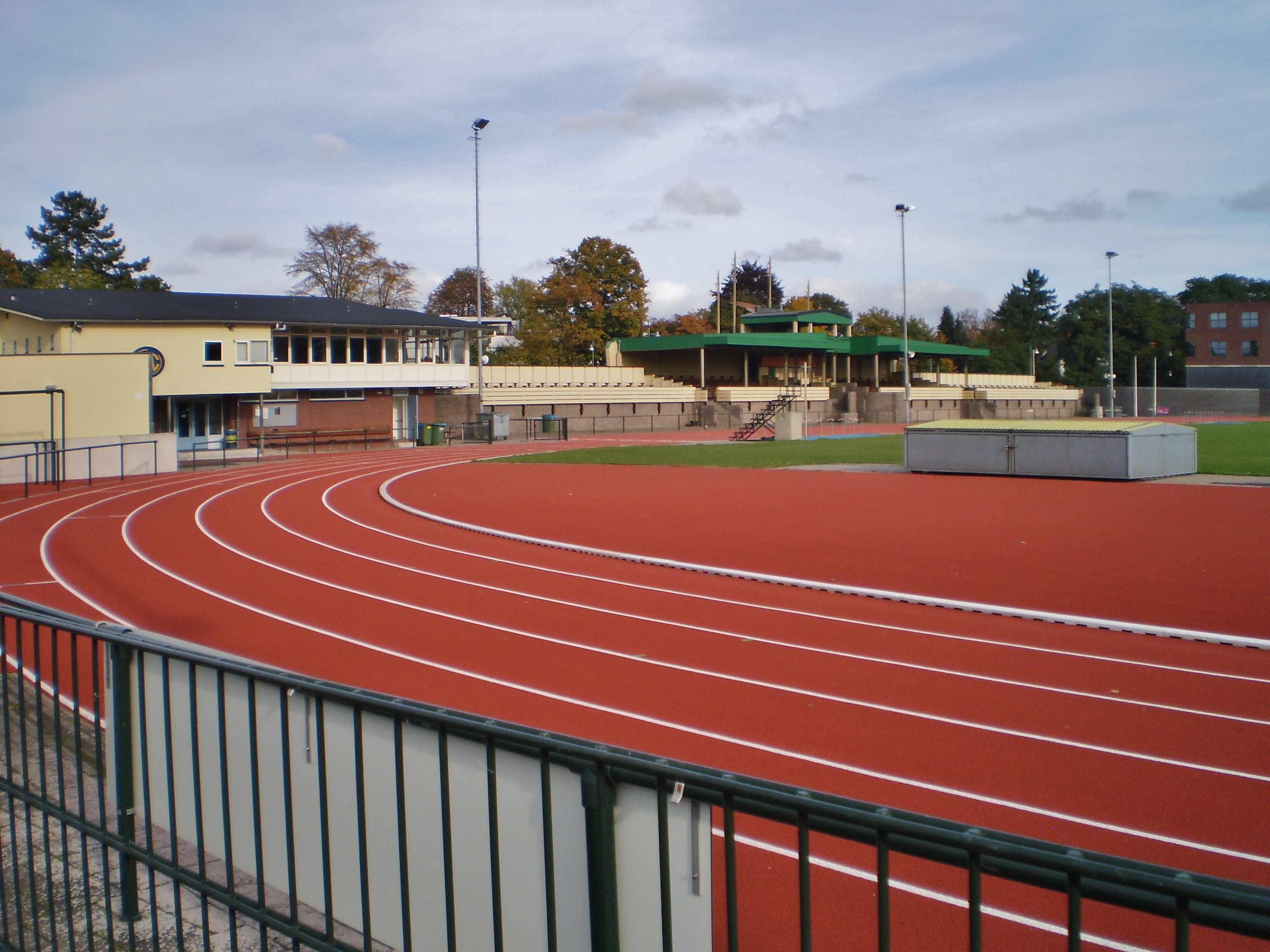 Atkletiekveld richting Dudoktribune